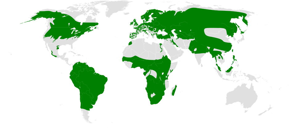 Riparia distribution map